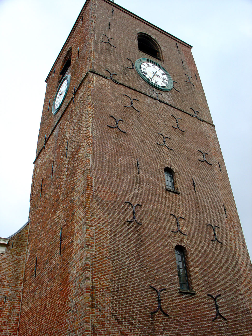 Mariakerk van Buitenpost